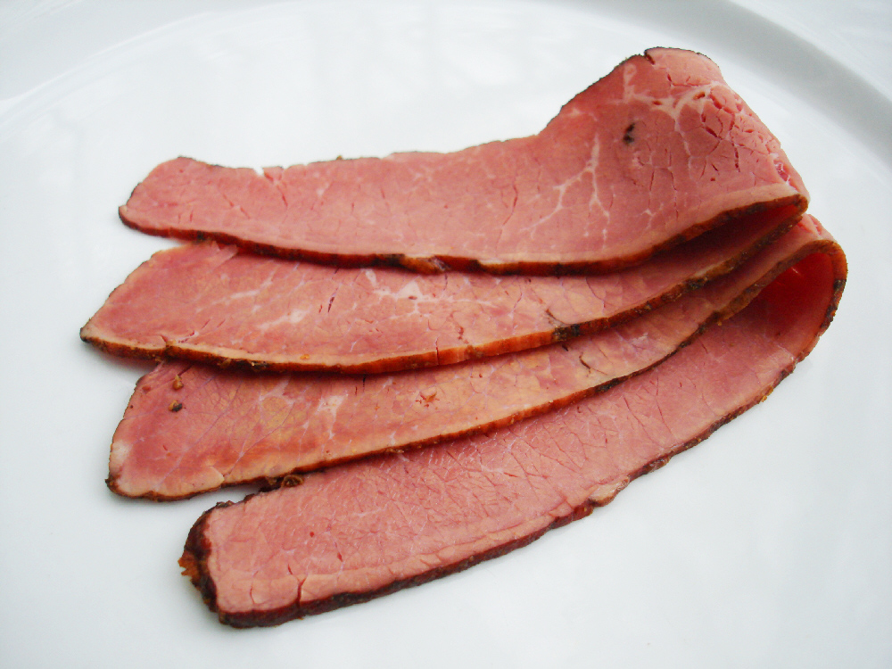 Pastrami